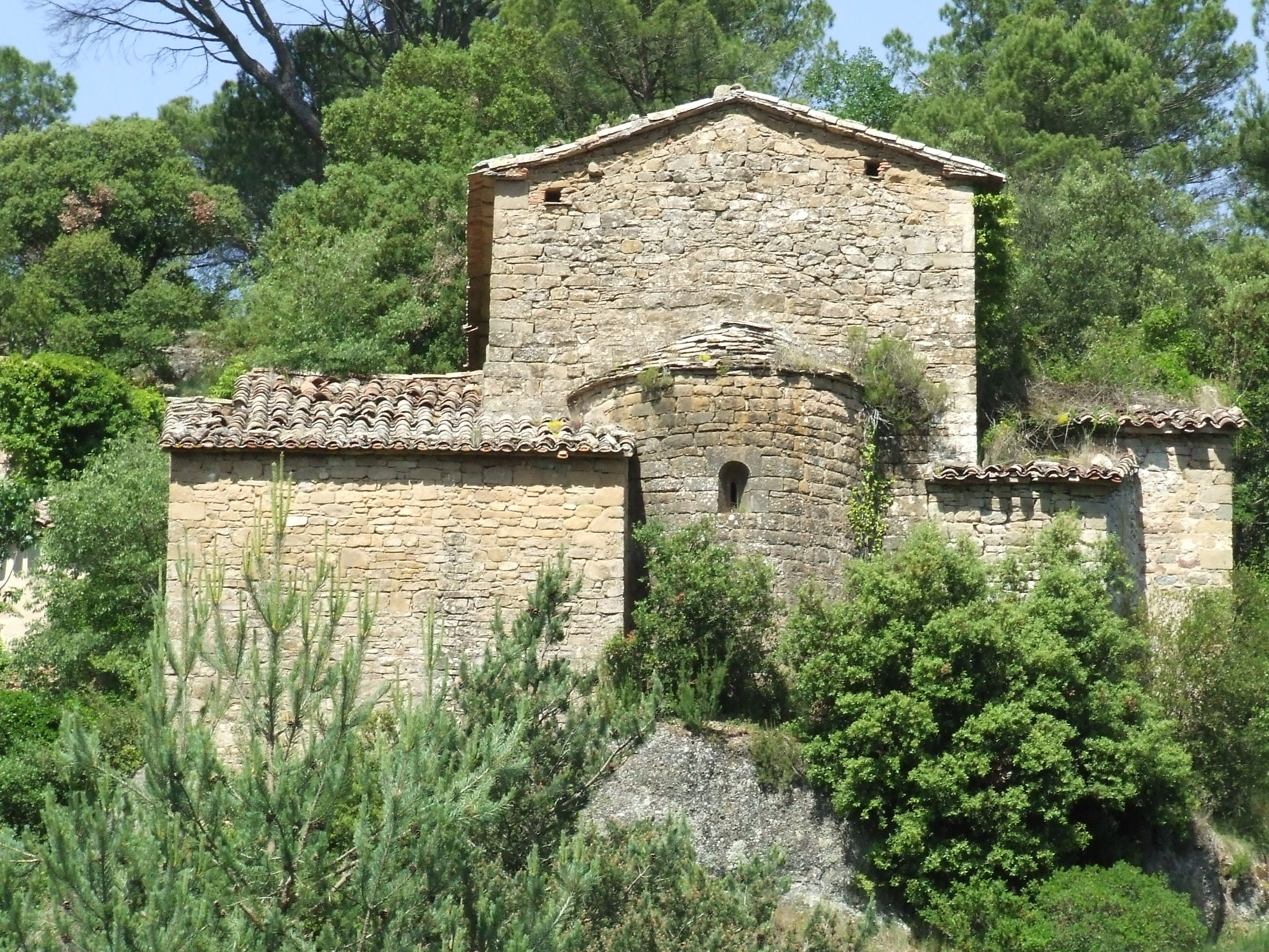 Sant Llogari de Castellet (Castellterçol, Moianès). Absis oriental